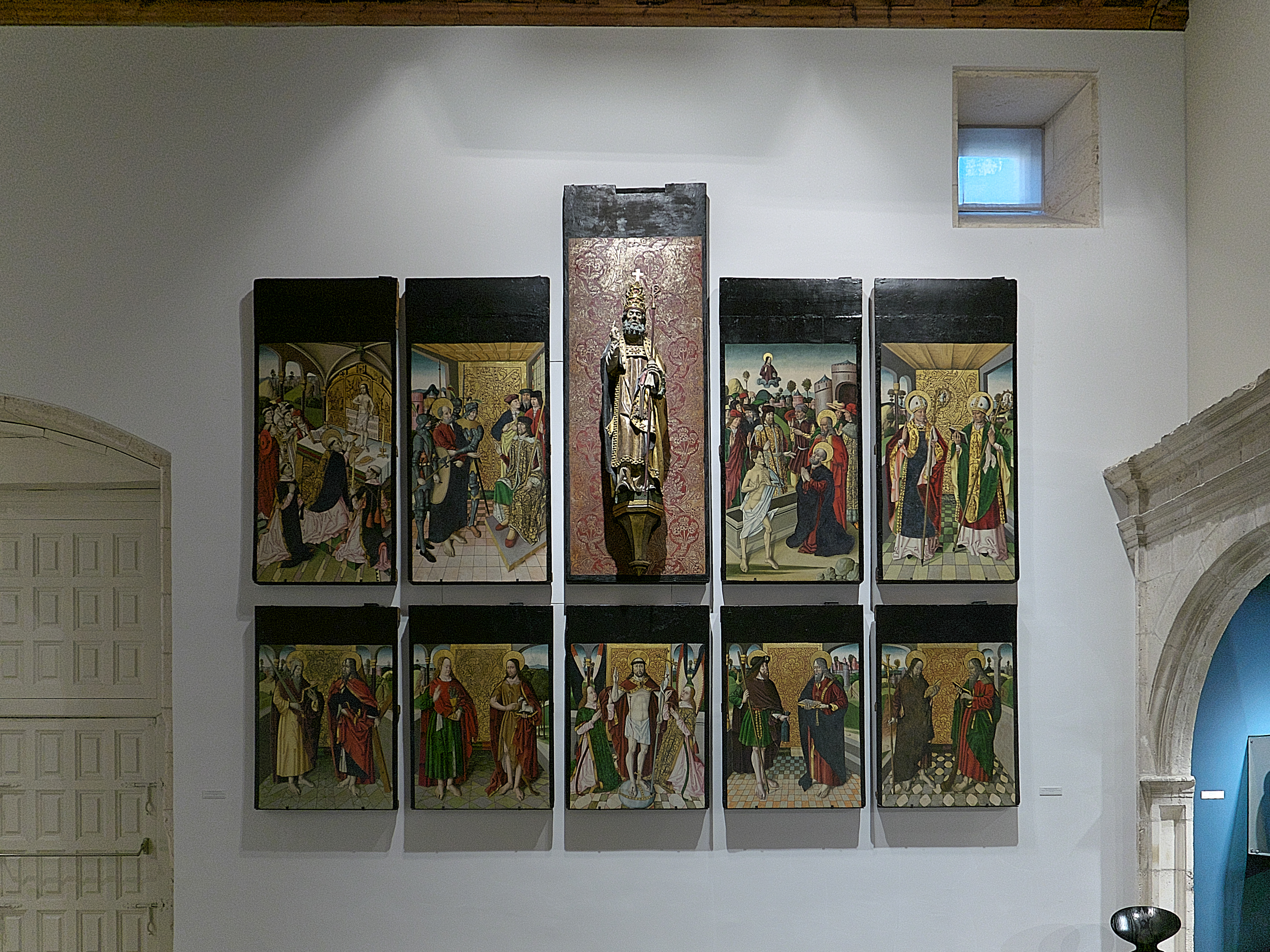 Parte del retablo (1503-1506) de la iglesia del Monasterio de San Pedro de Tejada, obra de fray Alonso de Zamora, Maestro de Oña.